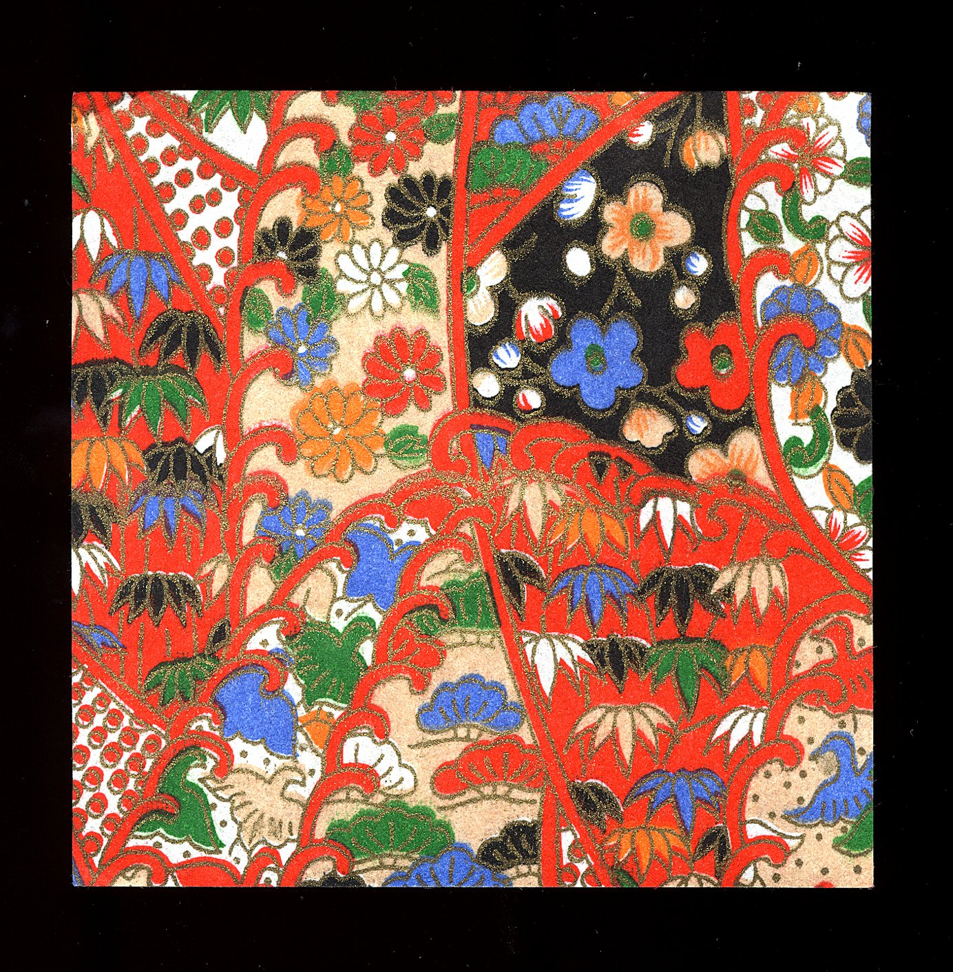 Chiyogami